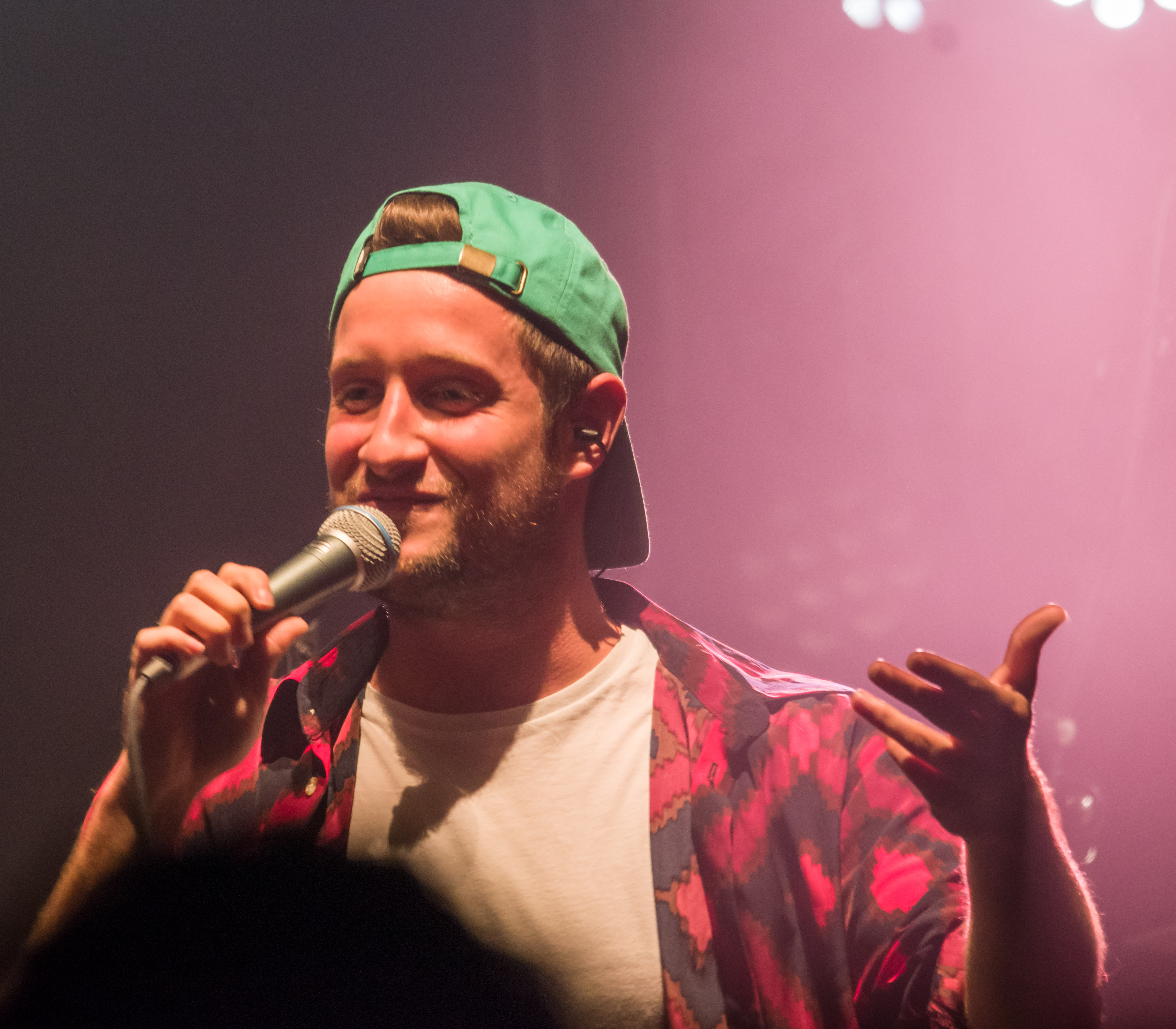 Das Zelt-Musik-Festival 2017 in Freiburg im Breisgau 12.07.2017 Teesy